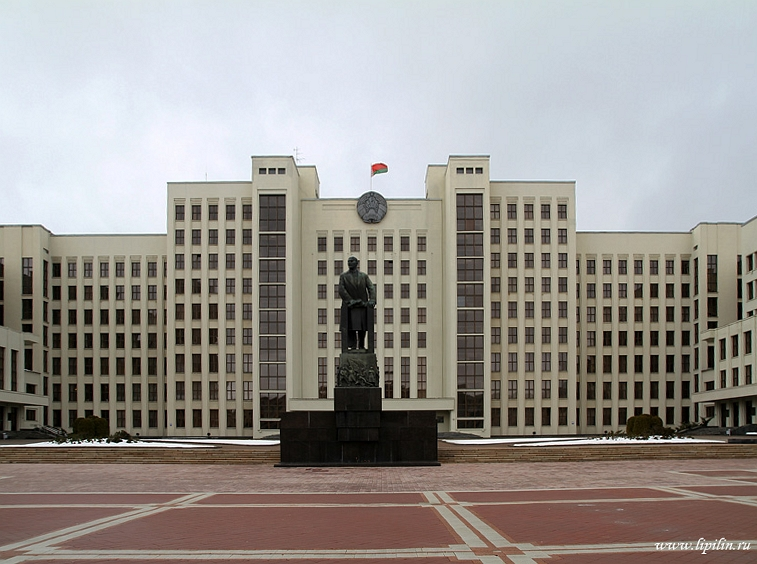 Мінск. Дом ураду